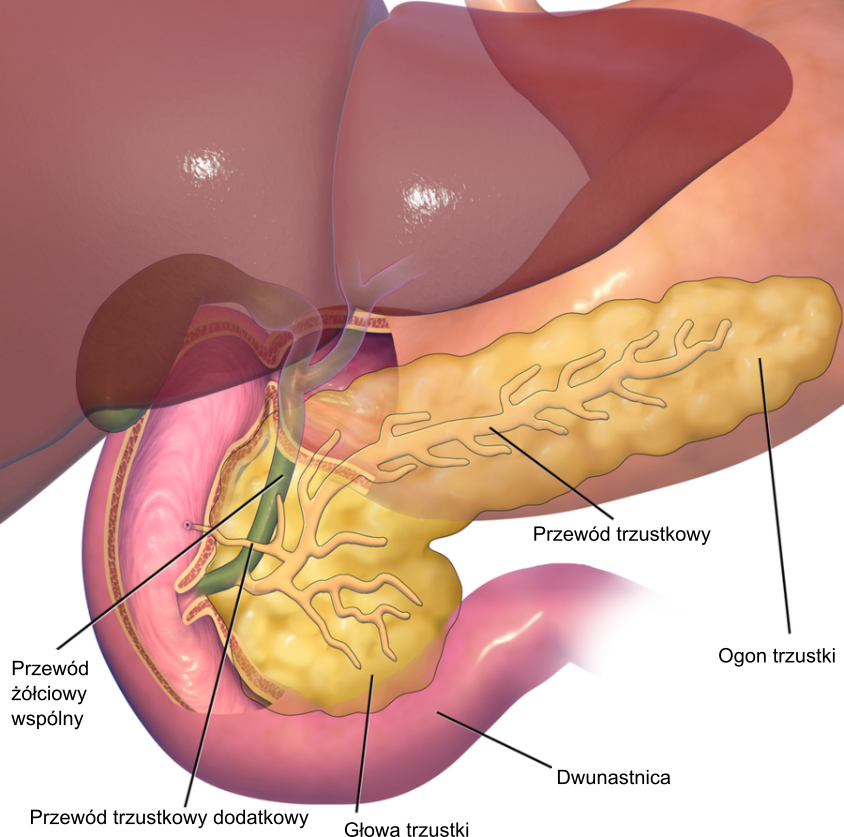 Stosunki anatomiczne trzustki